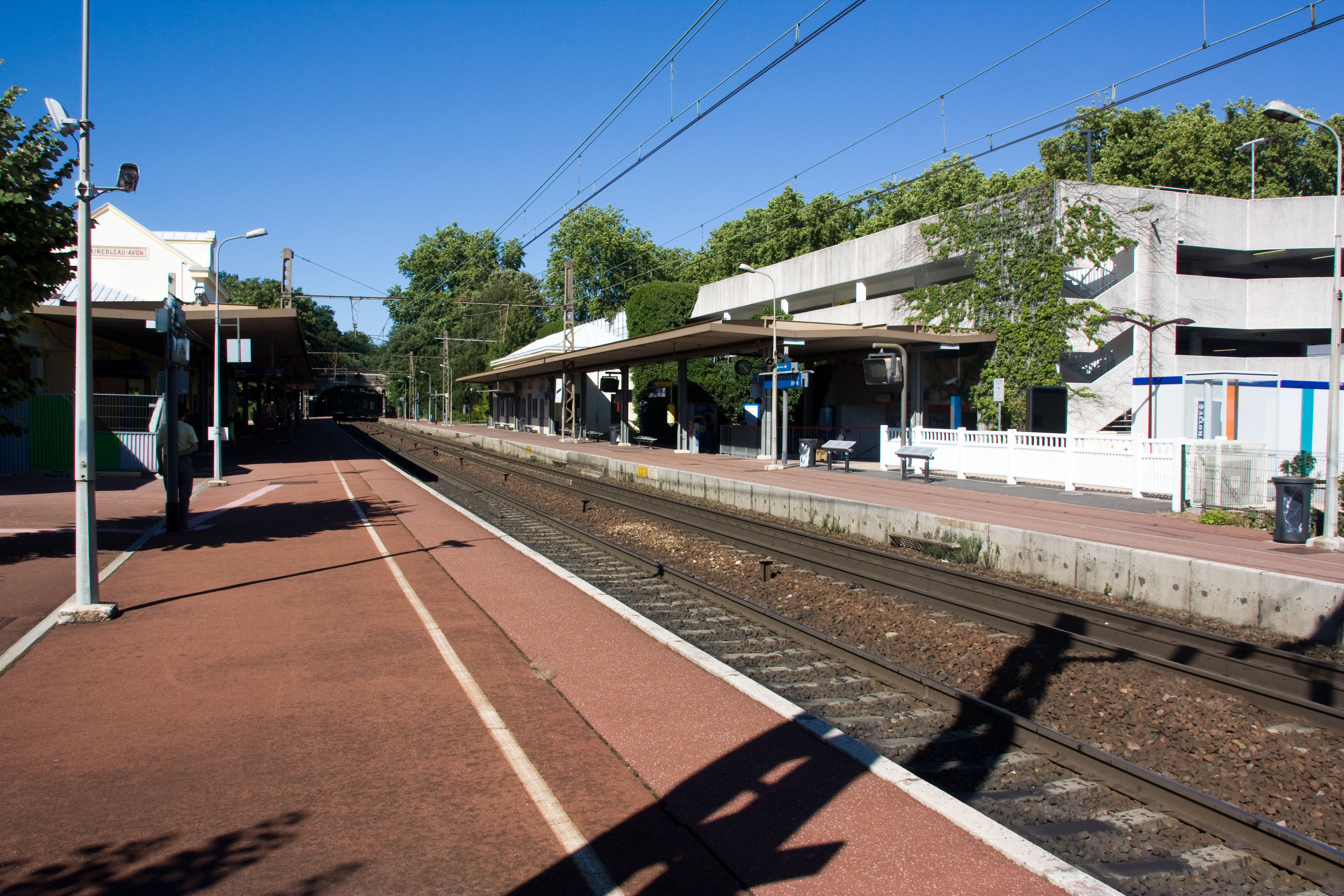 Gare de Fontainebleau - Avon, Avon, Seine-et-Marne, France